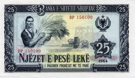 Albanian bill: 25 Lek